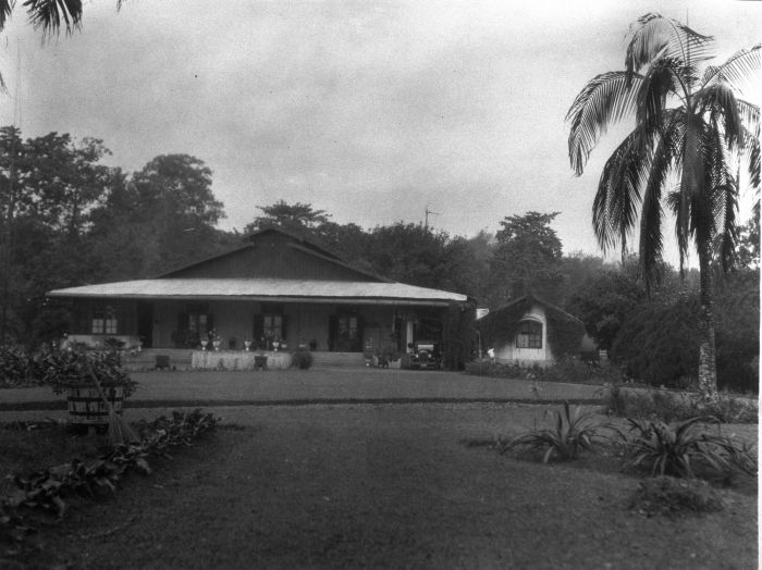 Foto. Een woonhuis op de rubberonderneming 'Zeelandia' iets ten noorden van Tanggoel op Oost-Java